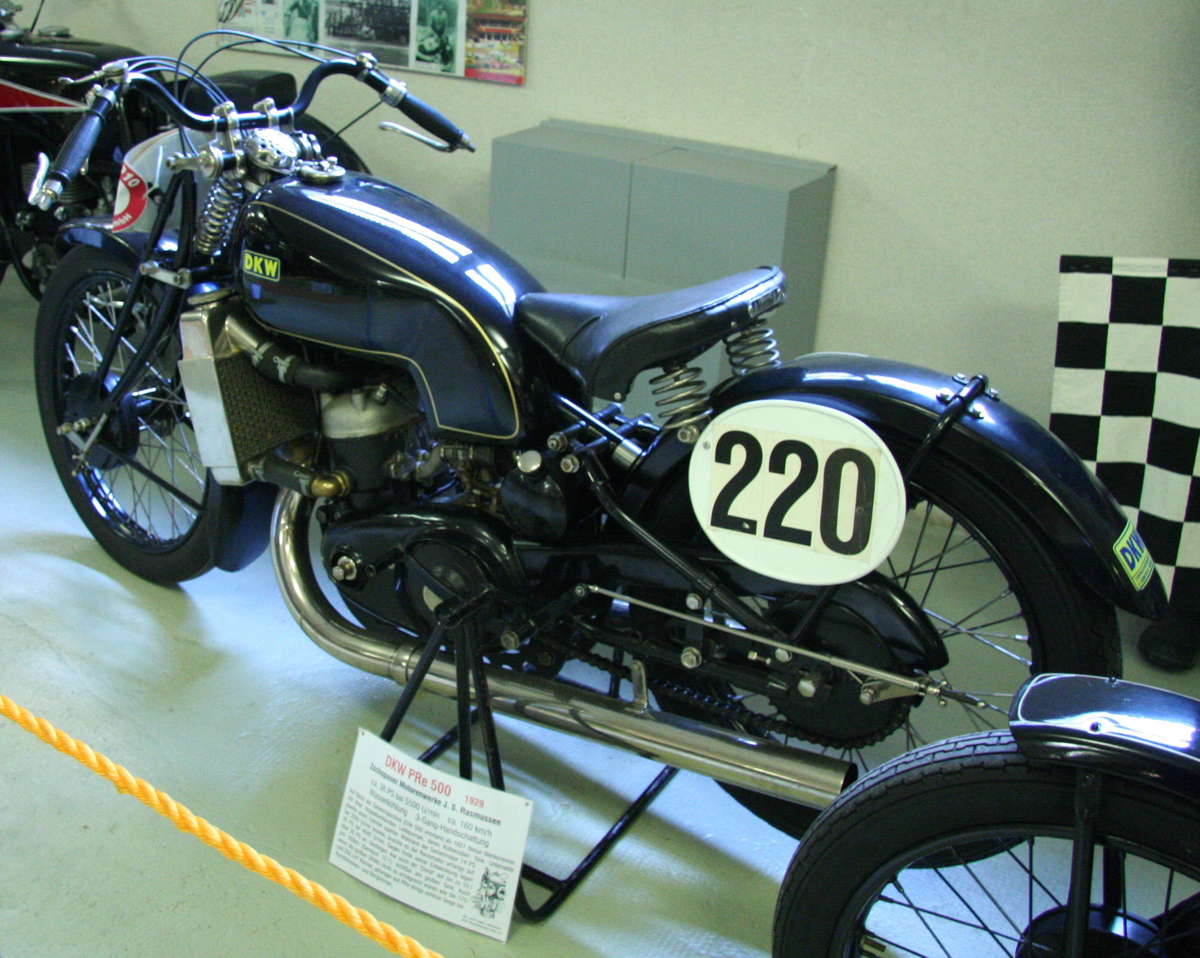 DKW Rennmaschine aus der Basisversion ZSW 500 entwickelt, DKW PRe 500, ca. 36 PS bei 5500 U/min, 3-Gang-Handschaltung, ca. 160 km/h, Baujahr 1929, im Museum für sächsische Fahrzeuge in Chemnitz.